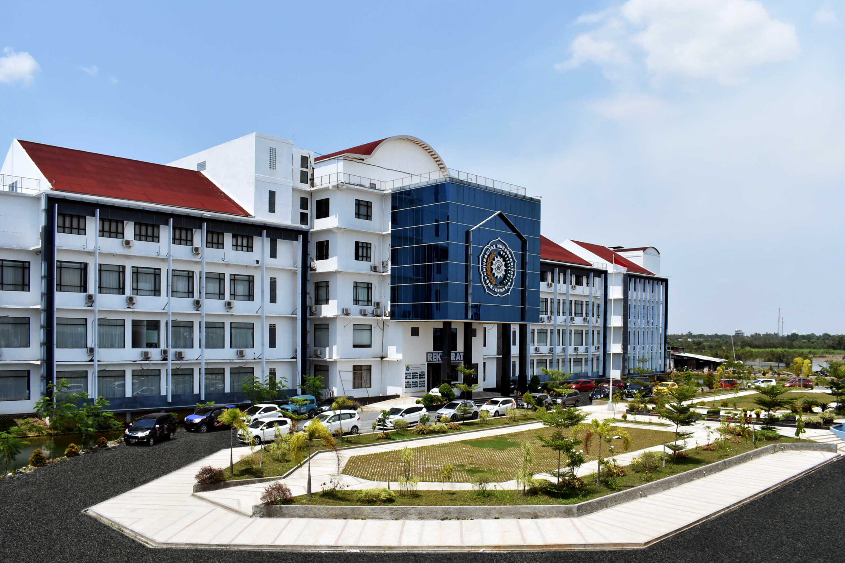 Gedung Ahmad Azhar Basyir Kampus Utama Universitas Muhammadiyah Banjarmasin